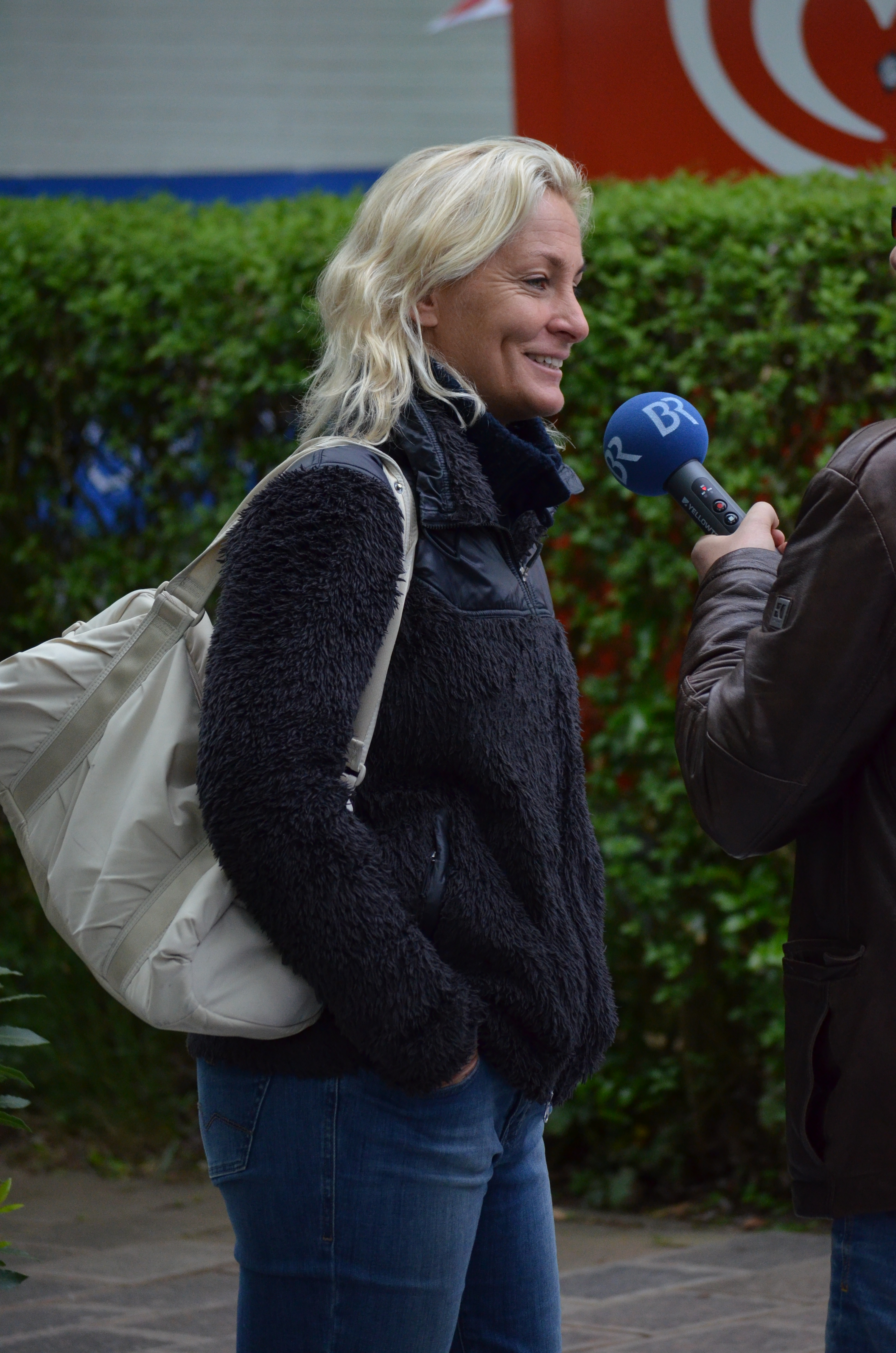 Barbara Rittner im Interview mit dem Bayerischen Rundfunk nach ihrem Eintreffen auf der Anlage des 1.FCN Tennis am Valznerweiher